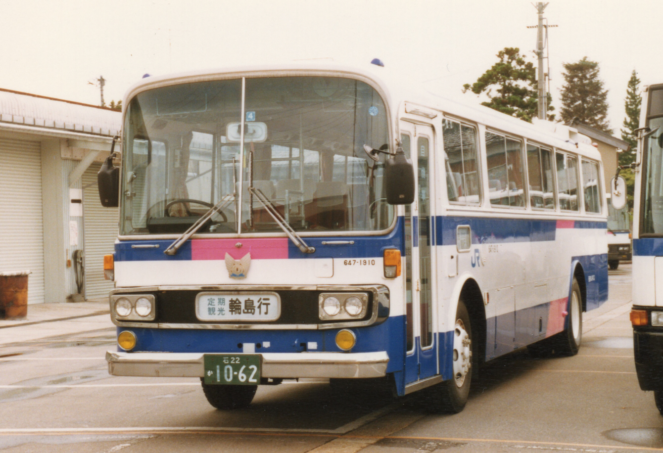 奥能登定期観光バス 末期の車両 穴水営業所にて